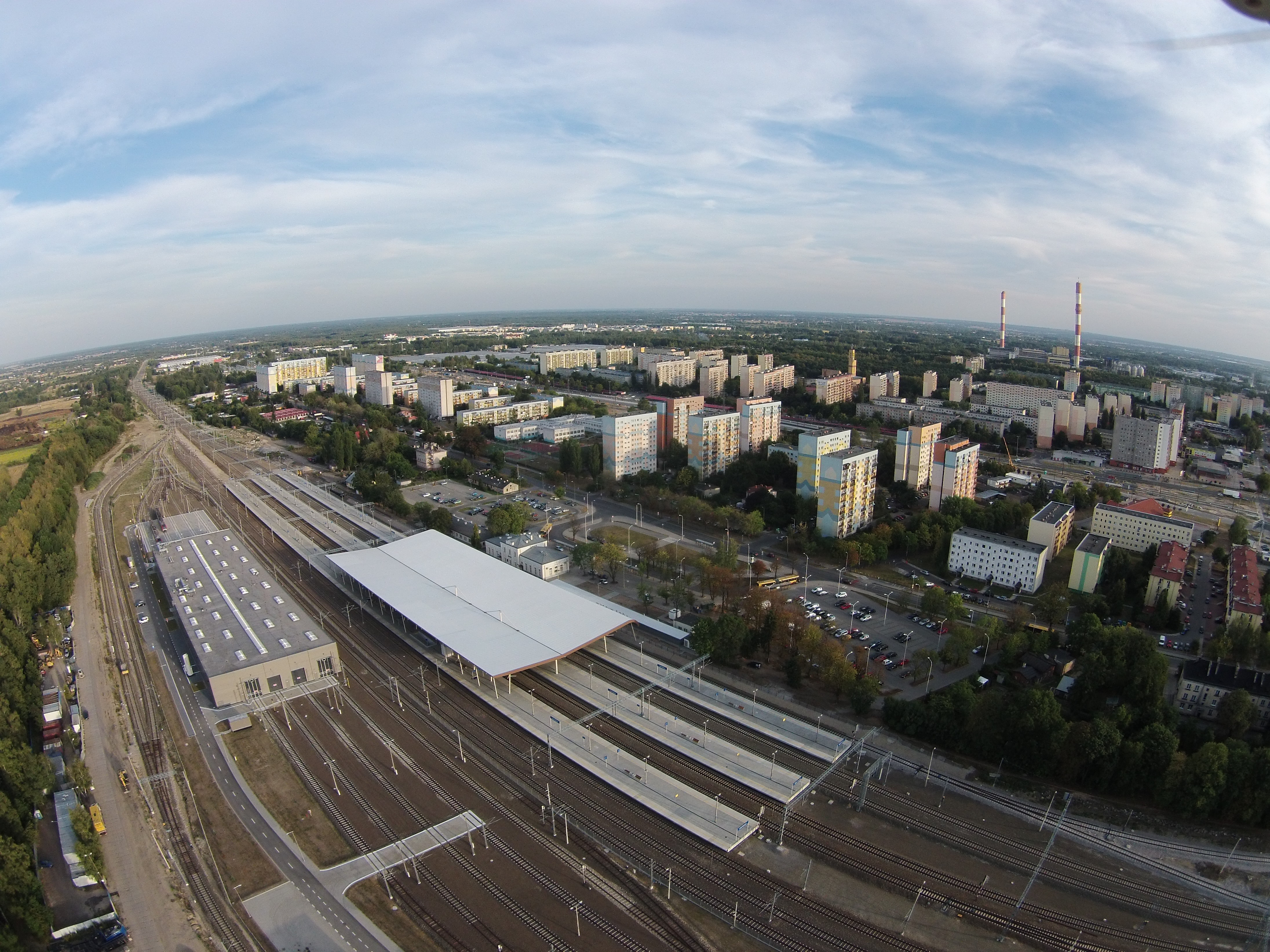 Osiedle mieszkaniowe Łódź Widzew oraz nowy dworzeckolejowyz lotu ptaka - Dji Phantom 3 - fot.stevenlodz